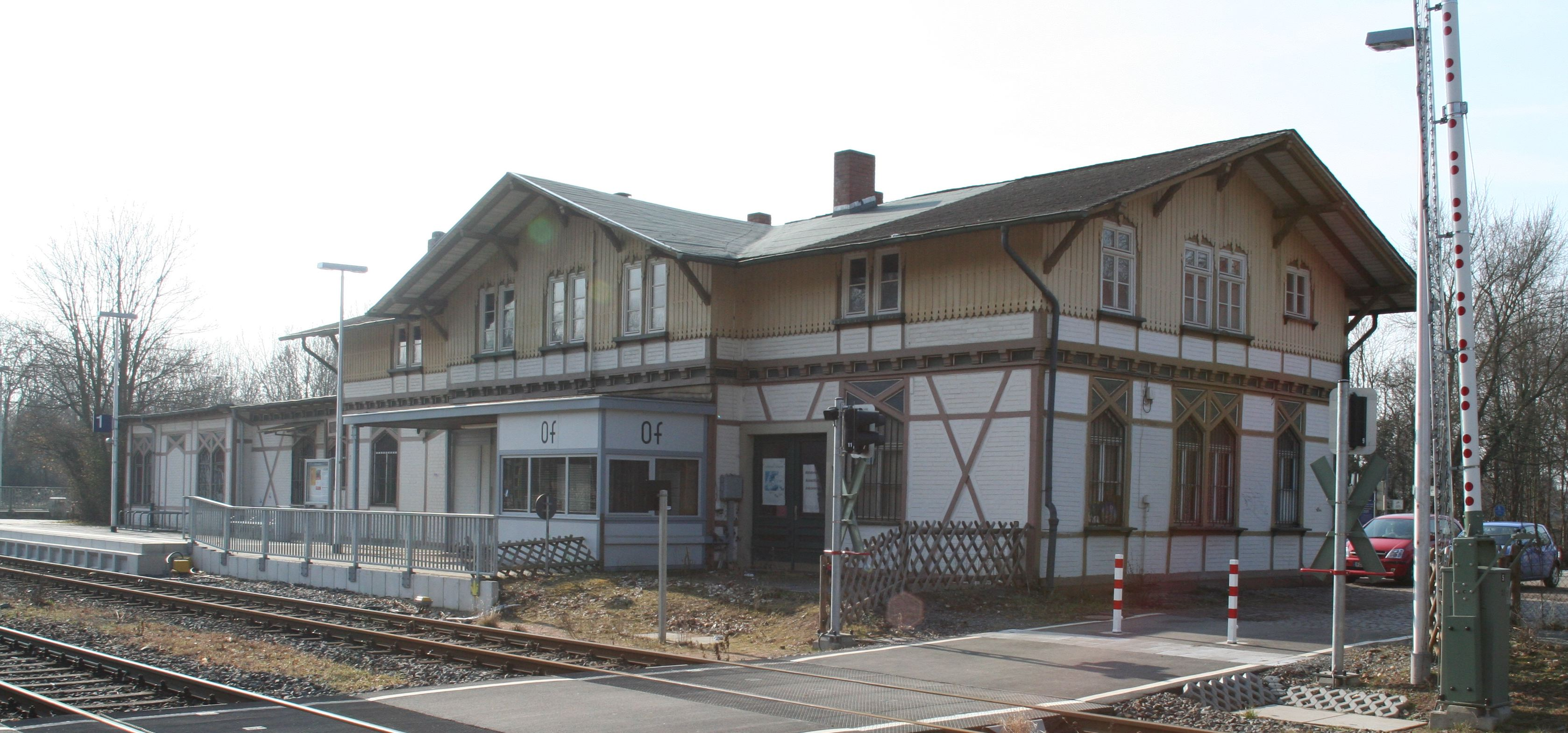 Empfangsgebäude Bahnhof Darmstadt Ost